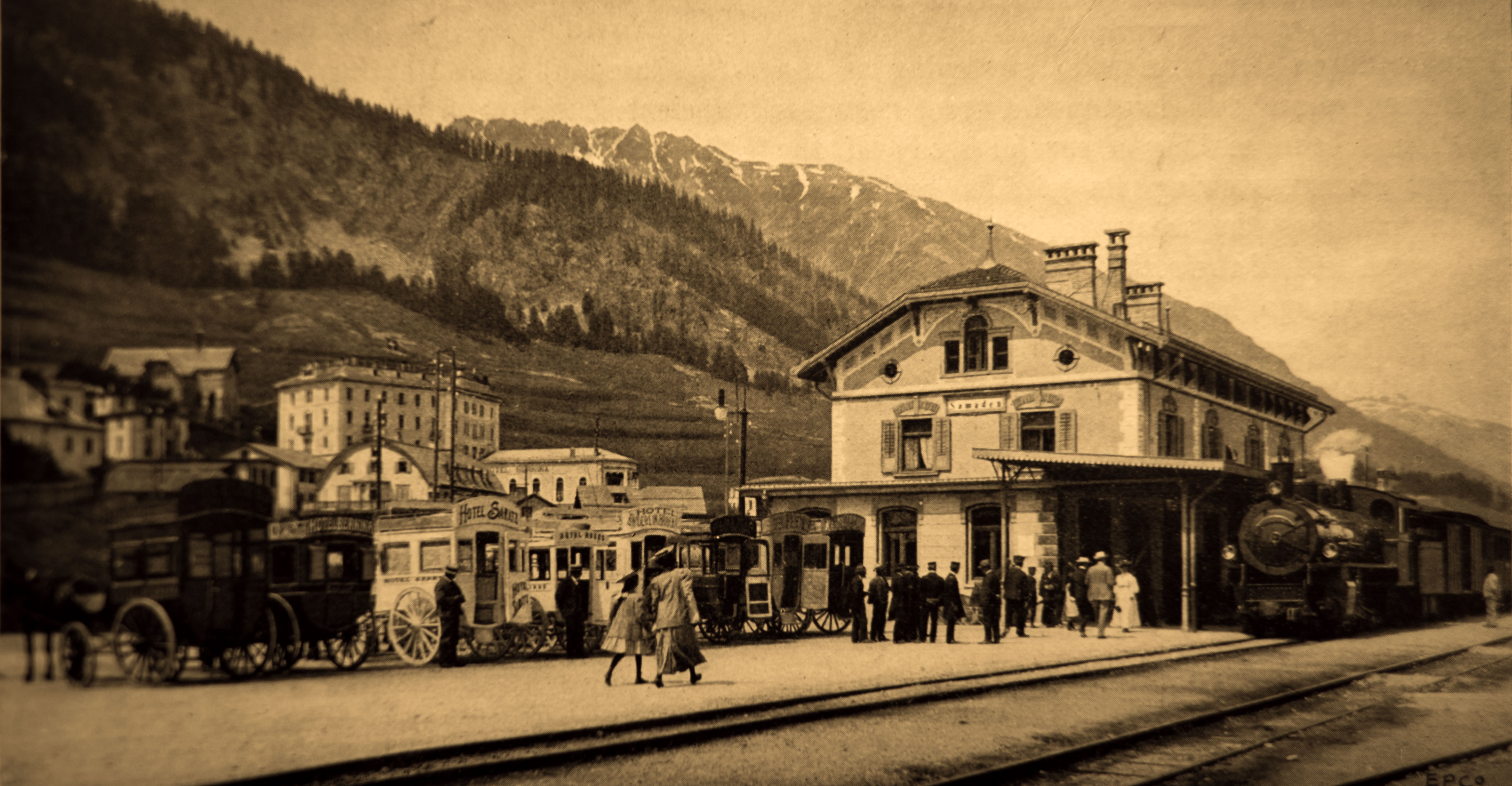 Pferdeomnibusse der Engadiner Hotels warten am Bahnhof Samedan auf die Gäste